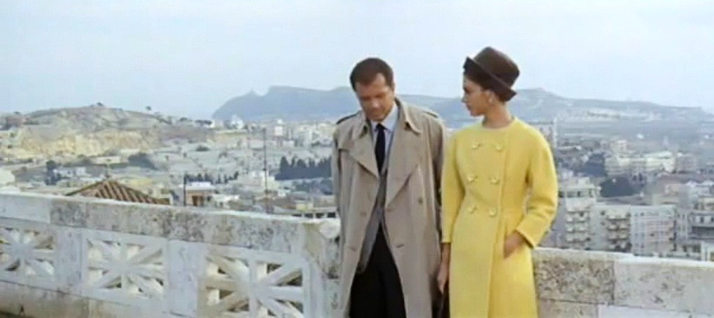 Cena do filme La Calda Vida (1963: Italy; 1967: USA), diretor: Florestano Vancini.